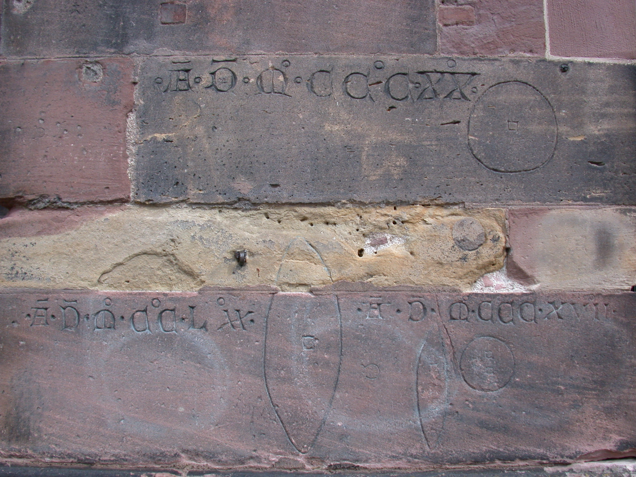 Brotmaße an der Stirnseite des nordwestlichen Turmstrebepfeilers des Freiburger Münsters: oben Rundlaib mit Jahreszahl 1320, unten großer Spitzwecken von 1270 und kleiner Spitzwecken und Rundlaib von 1317. Bei hohem Getreidepreis mussten "kleine Brötchen" gebacken werden zu gleichem Preis. Quelle: Freiburger Münsterbauverein (Hrsg.); Yvonne Faller, Heike Mittmann, Stephanie Zumbrink, Wolfgang Stopfel: Das Freiburger Münster. Schnell und Steiner, Regensburg 2011, ISBN 978-3-7954-1685-0. Quelle: Foto selber gemacht Autor: Lutz Mager